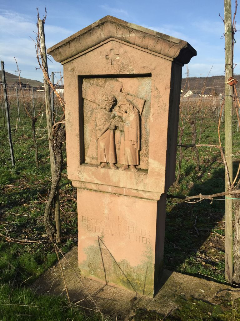 Kreuzweg Trittenheim - Station 4 von 14